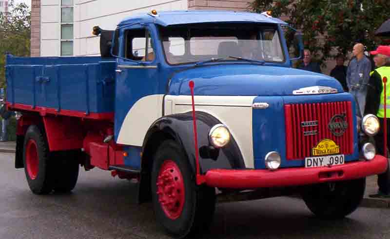 Volvo L 49506 130 Truck 1960